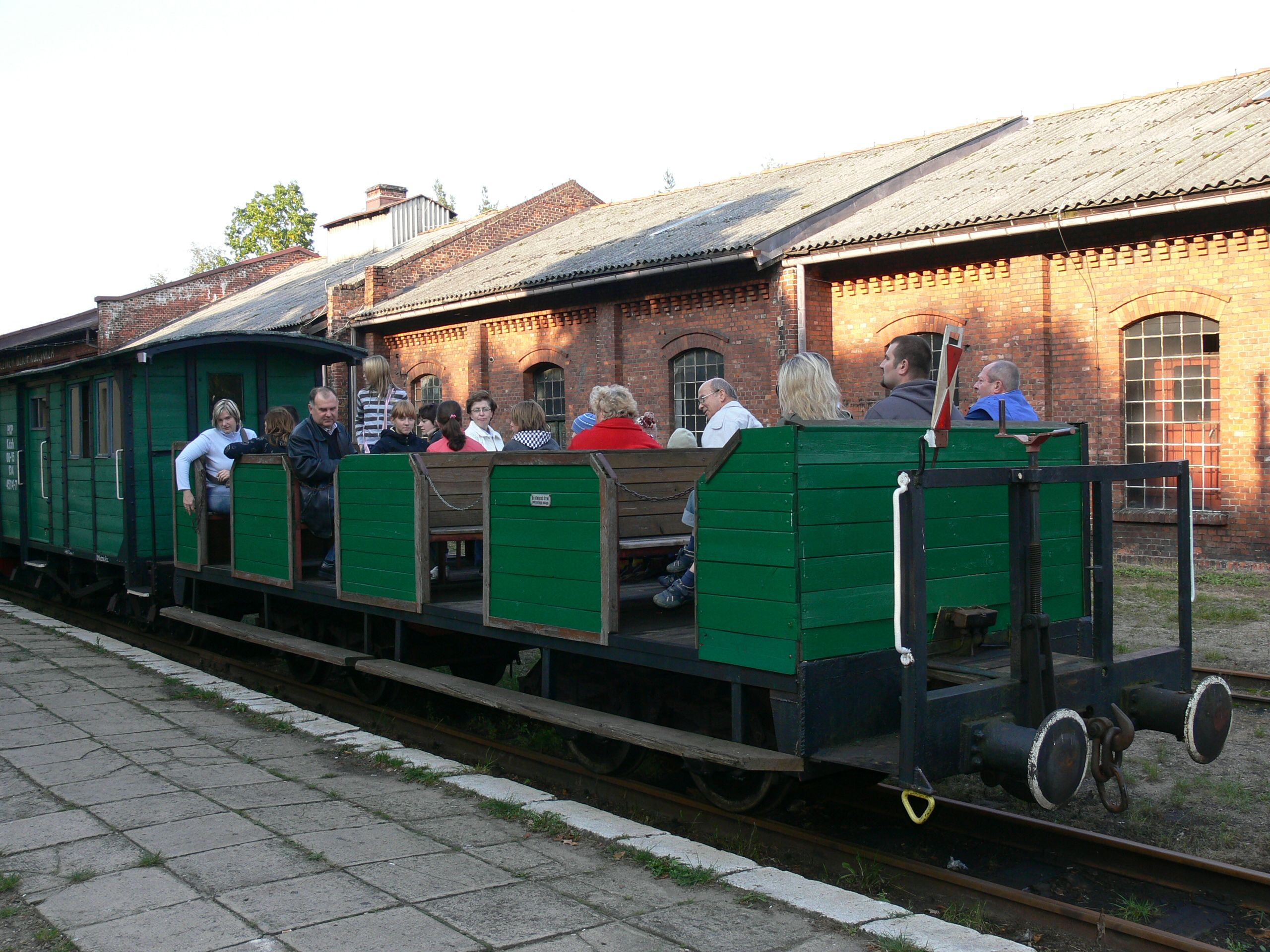 Rudy (Raciborskie) - wagony kolejki wąskotorowej